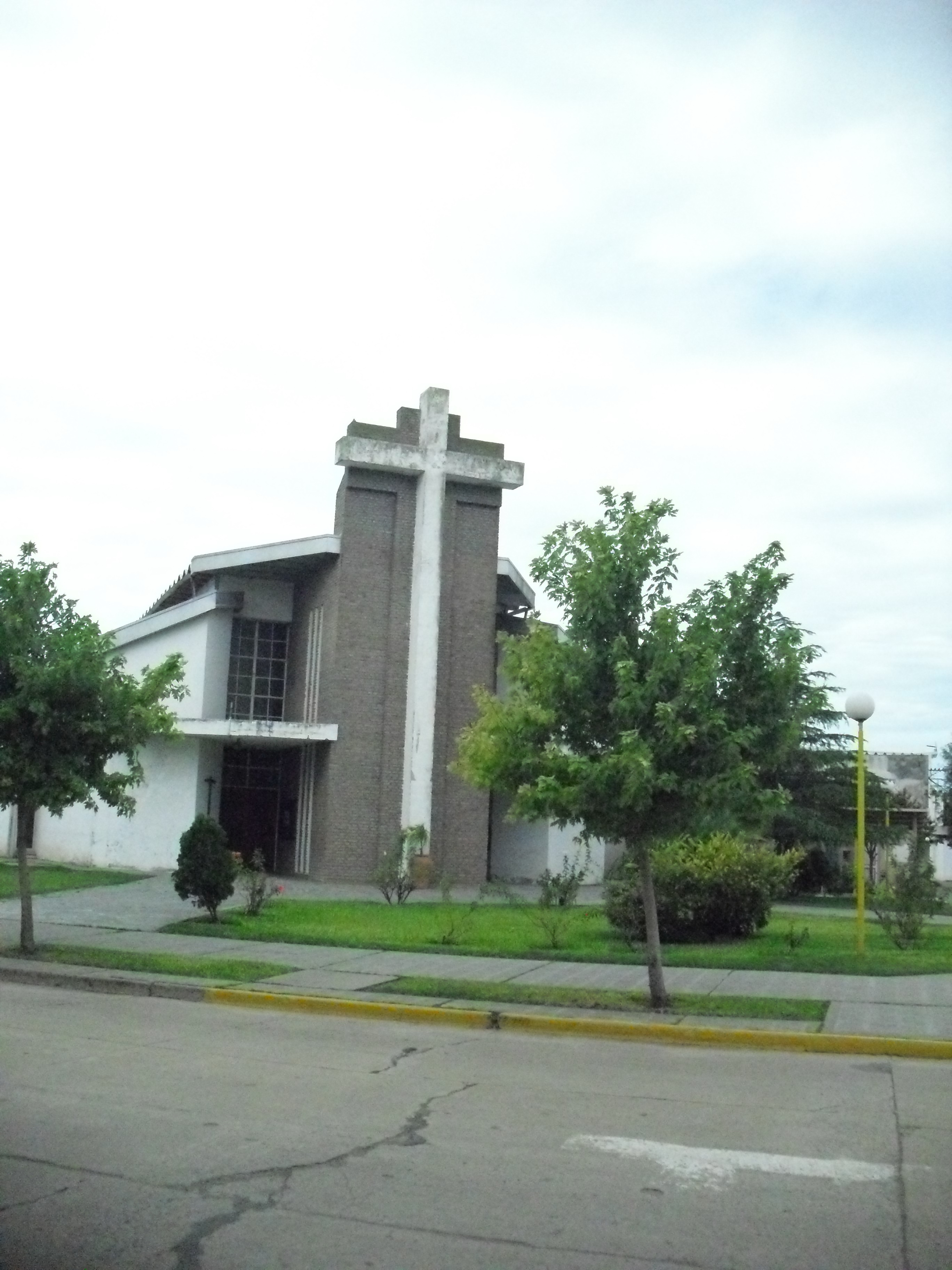 Parroquia San Luís Gonzaga - Ciudad de Calchaquí - Santa Fe - Argentina